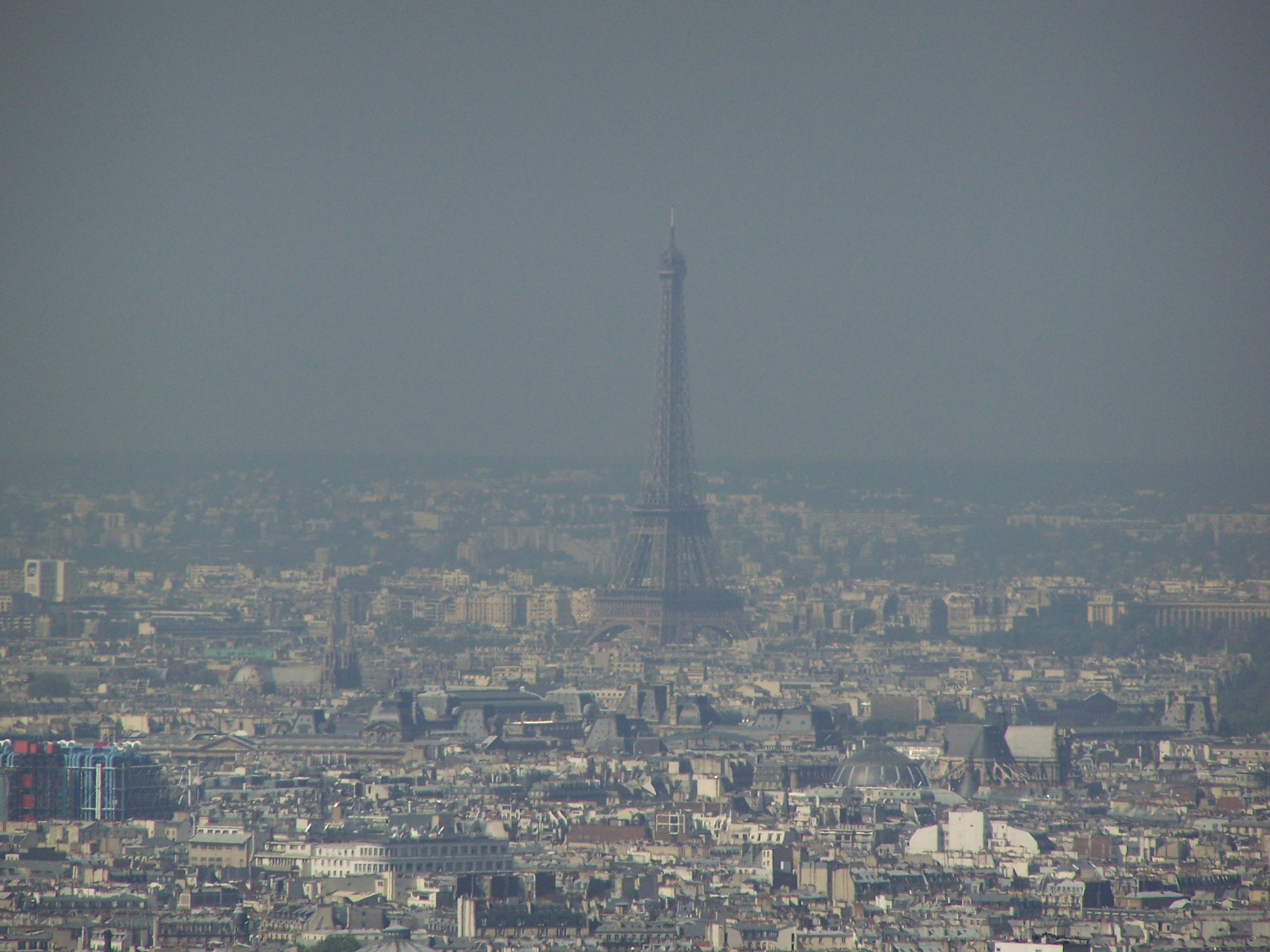 Tour Eiffel depuis l'une des tours Mercuriales de Bagnolet.